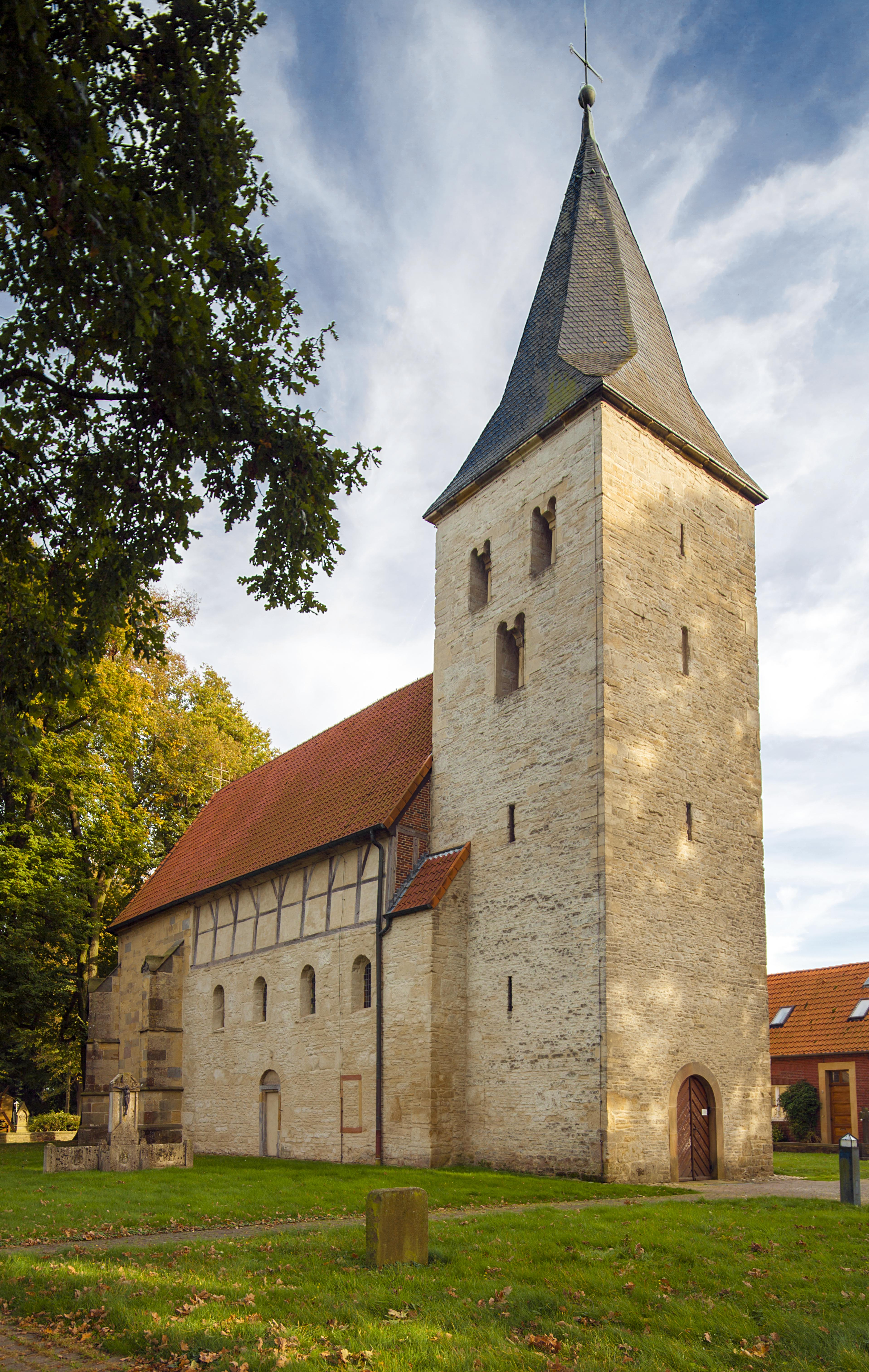 Welbergen, alte Kirche St. DionysiusThis is a photograph of an architectural monument., no. 15